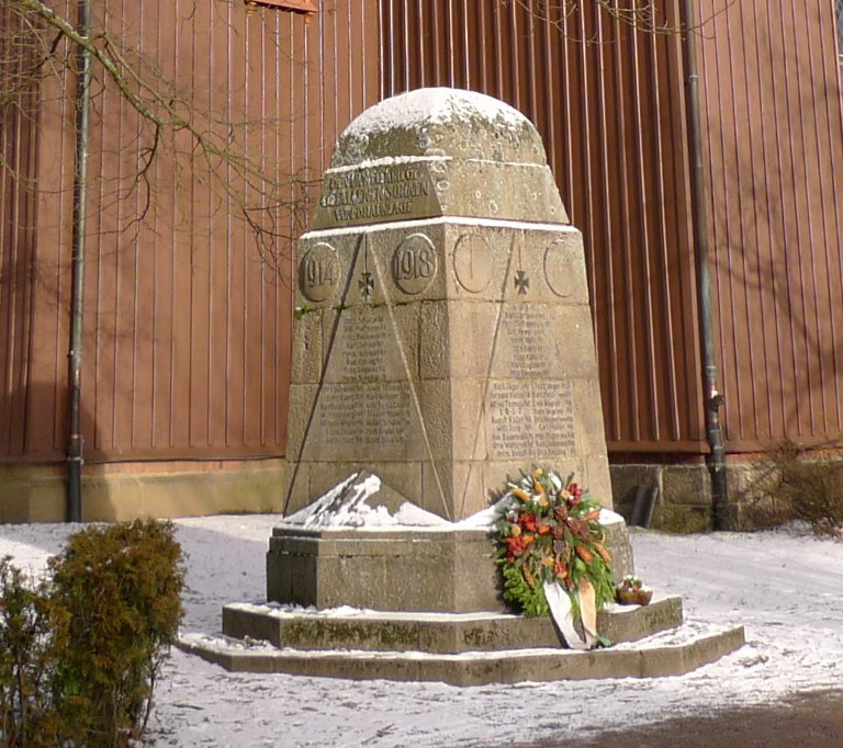 Kriegerdenkmal an der Trinitaskirche in Braunlage